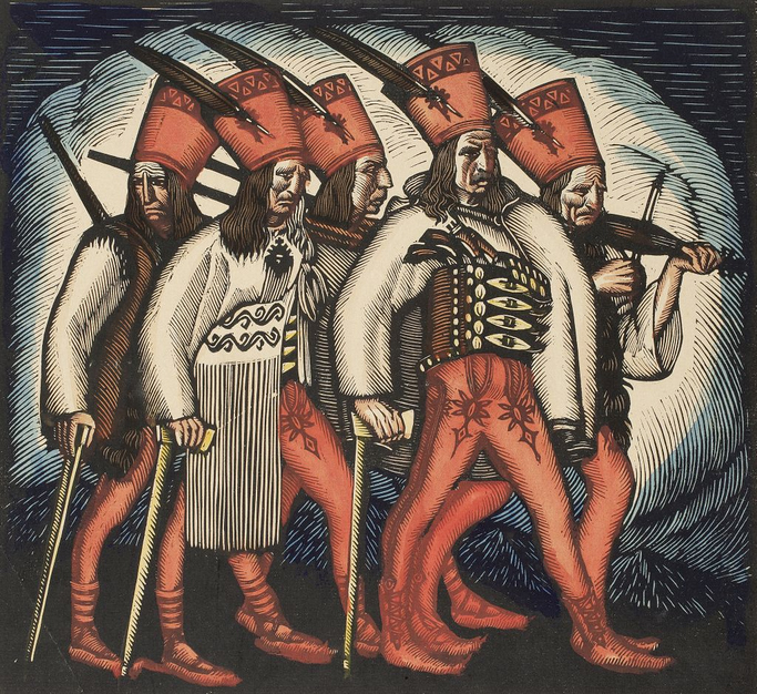 Pochód zbójników, color wood engraving, 28 x 31 cm